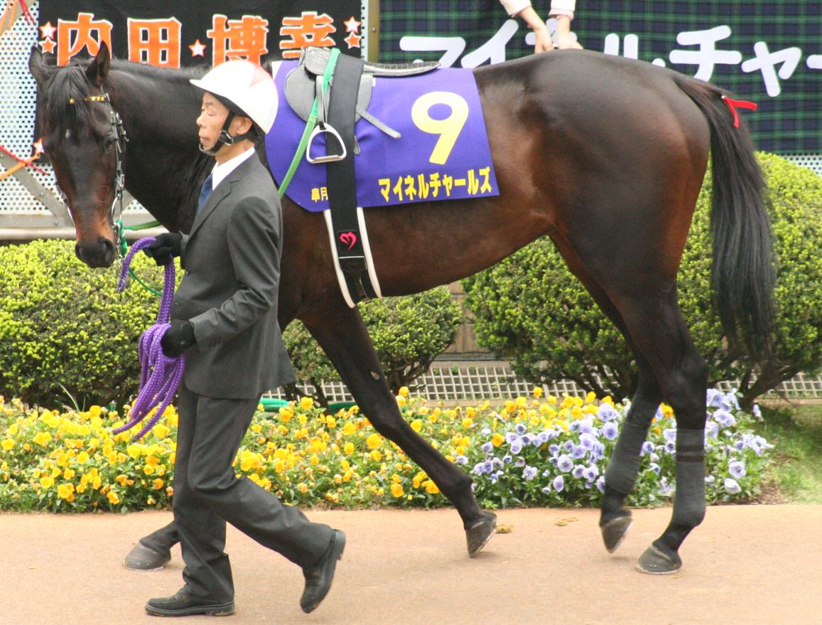 マイネルチャールズ（中山競馬場 第68回皐月賞）